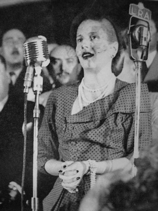 Evita dando un discurso en la CGT